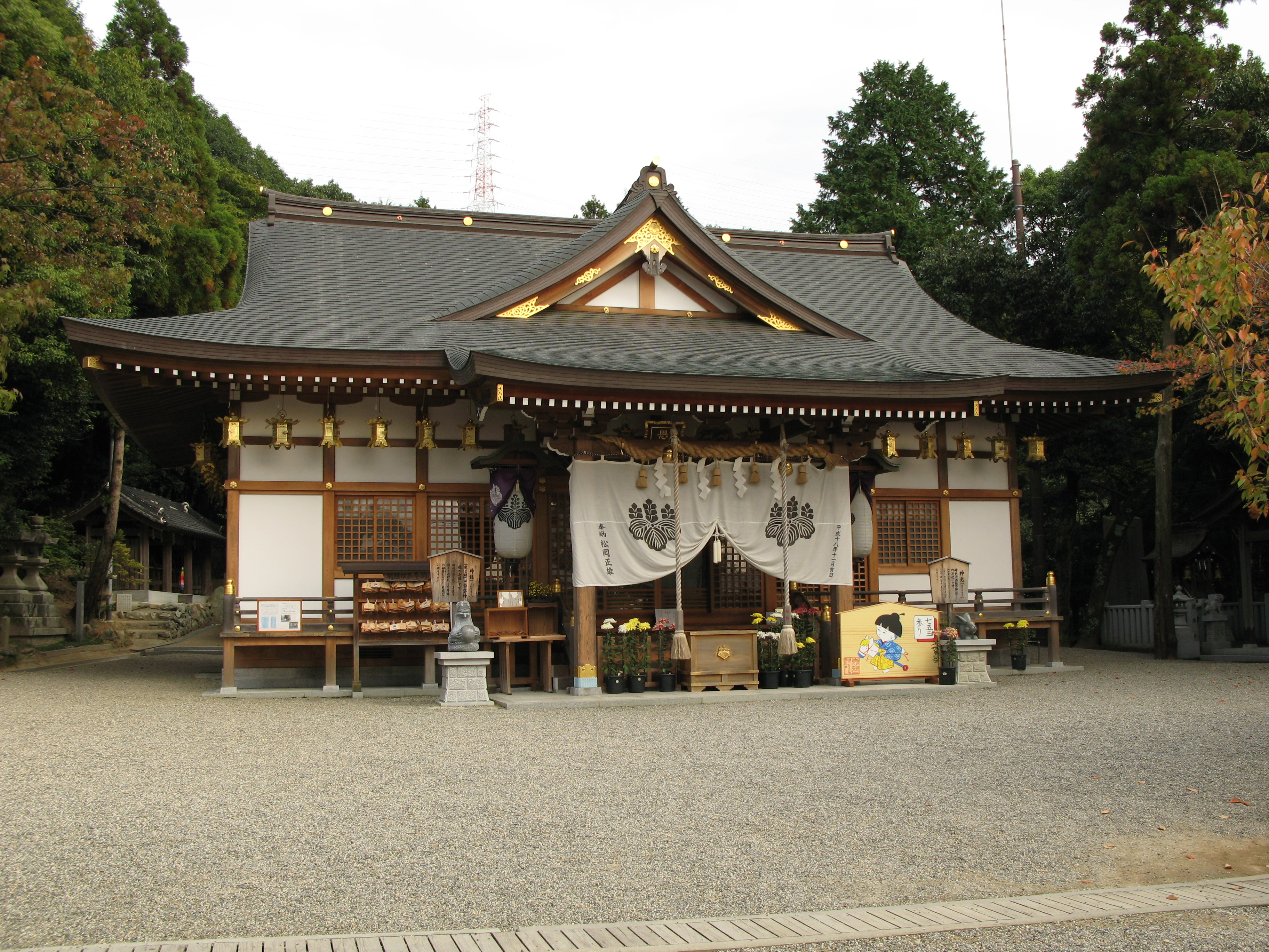 Onji Shrine in Yao, Osaka, Japan